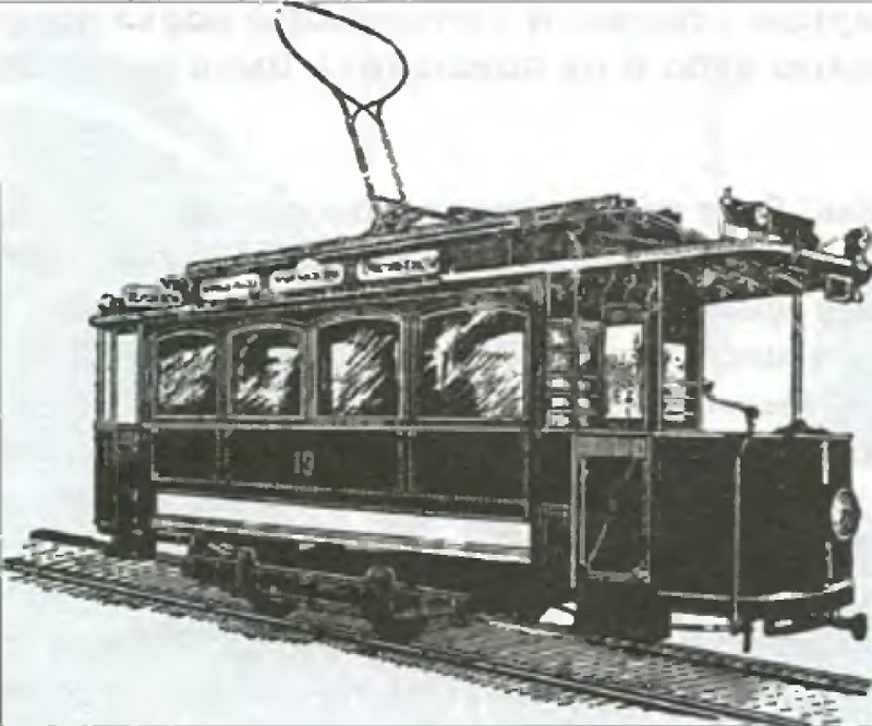 Первый вагон электрического трамвая производства "Фанкельрид"